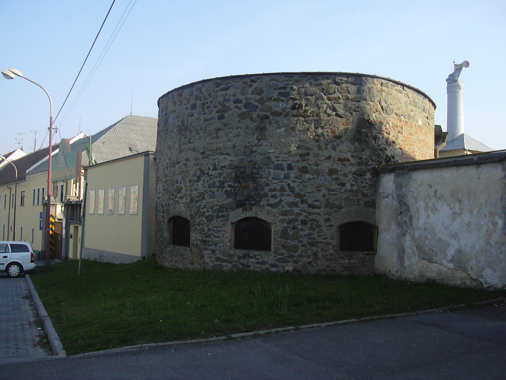 Zbytky hradeb 3(Vyškov- czech republic)